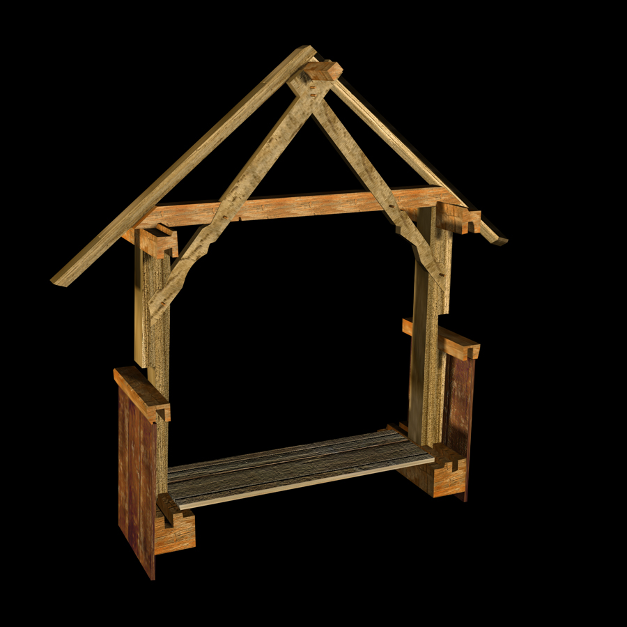 Kapellbrücke, Binder 18, 3D-Rekonstruktion